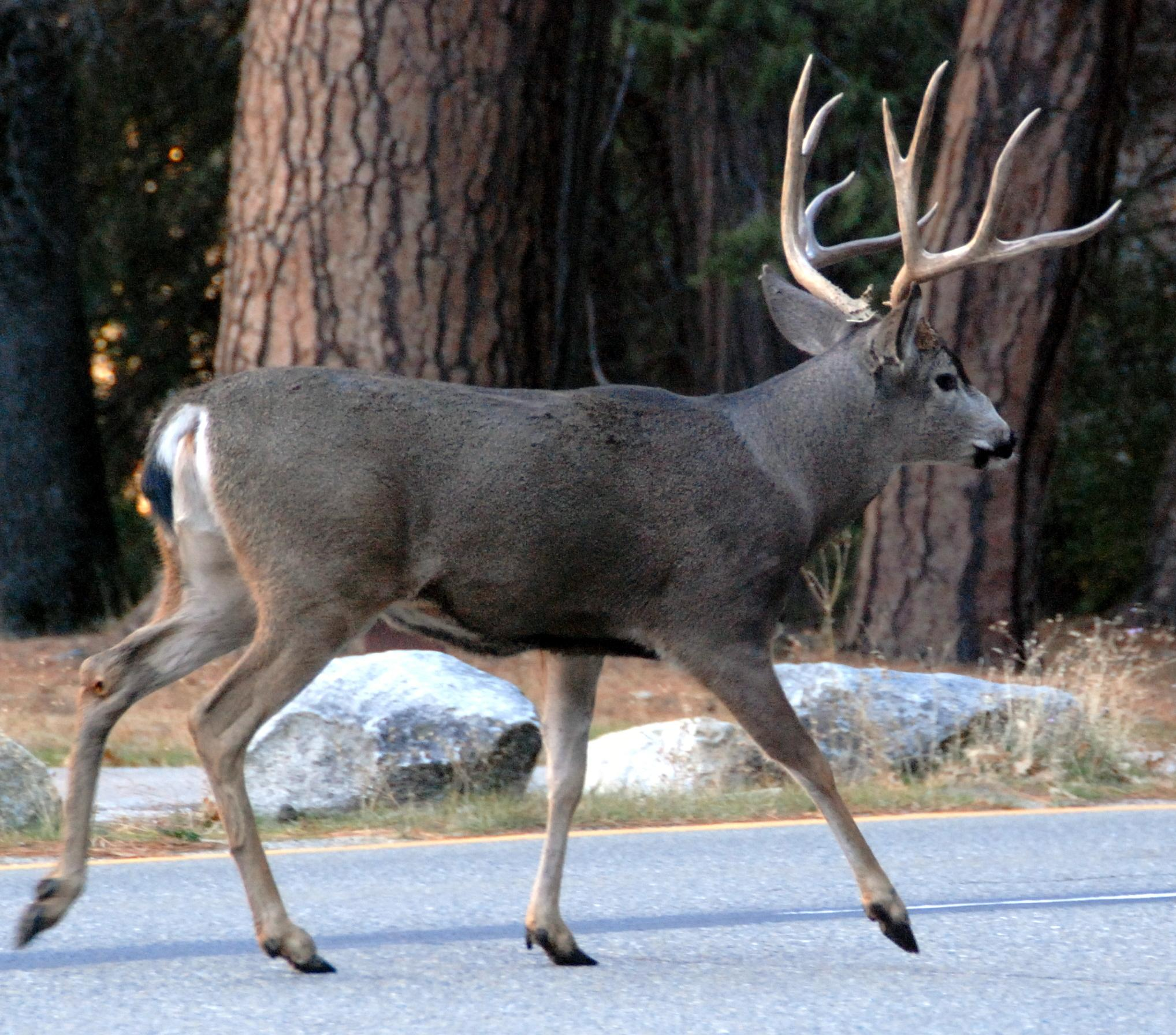 Mule deer on Yosemite Valley floor